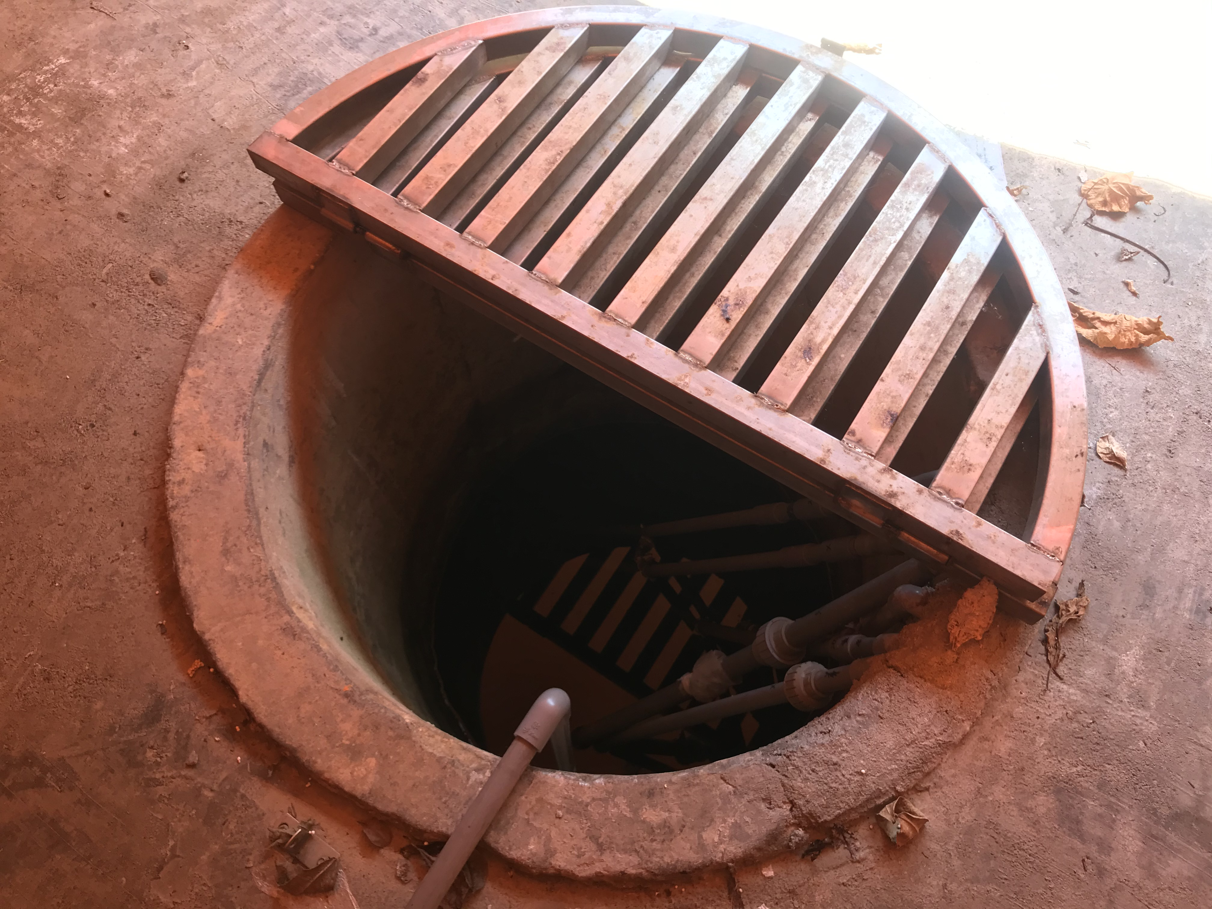 中文（台灣）: 和平島龍目井口